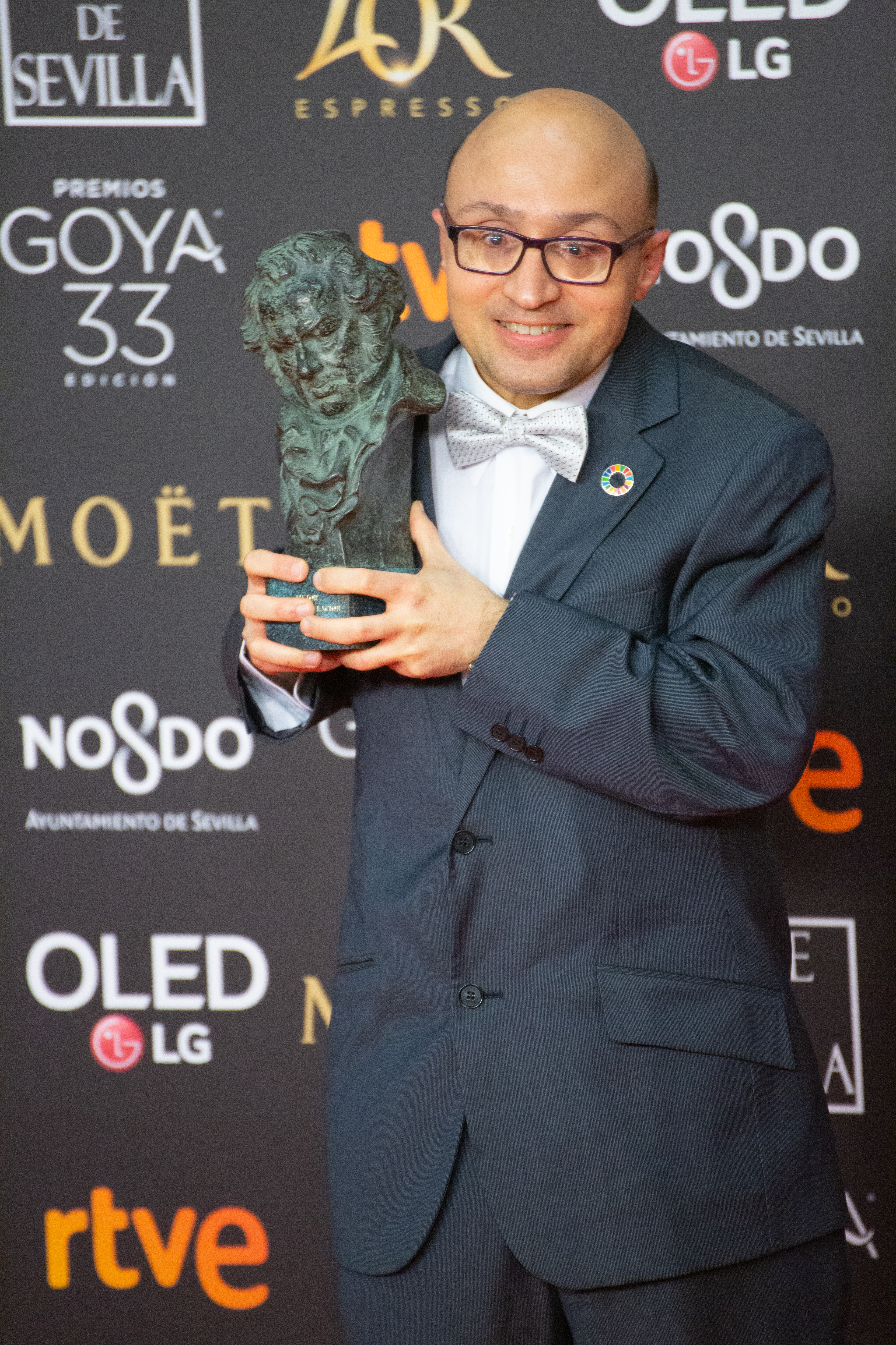 Jesús Vidal. Goya al mejor actor revelación por el papel de Marín en Campeones Entrega de premios celebrada en el Fibes de Barcelona el dos de Febrero de 2019